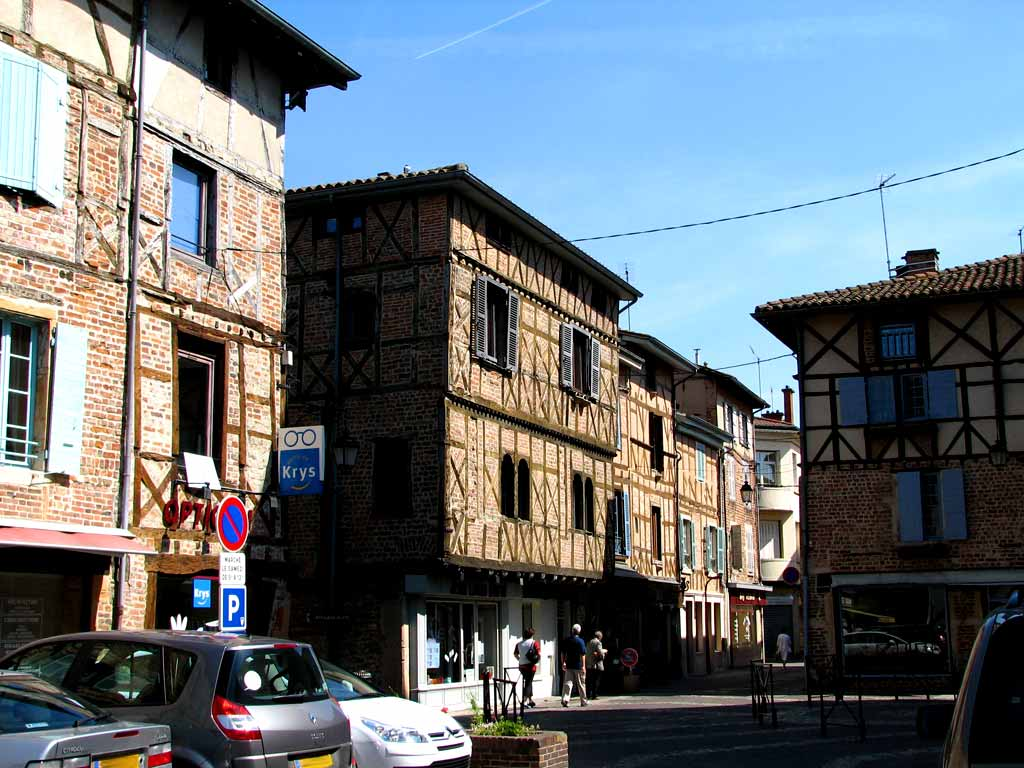 Châtillon-sur-Chalaronne, maisons à colombage et en briques